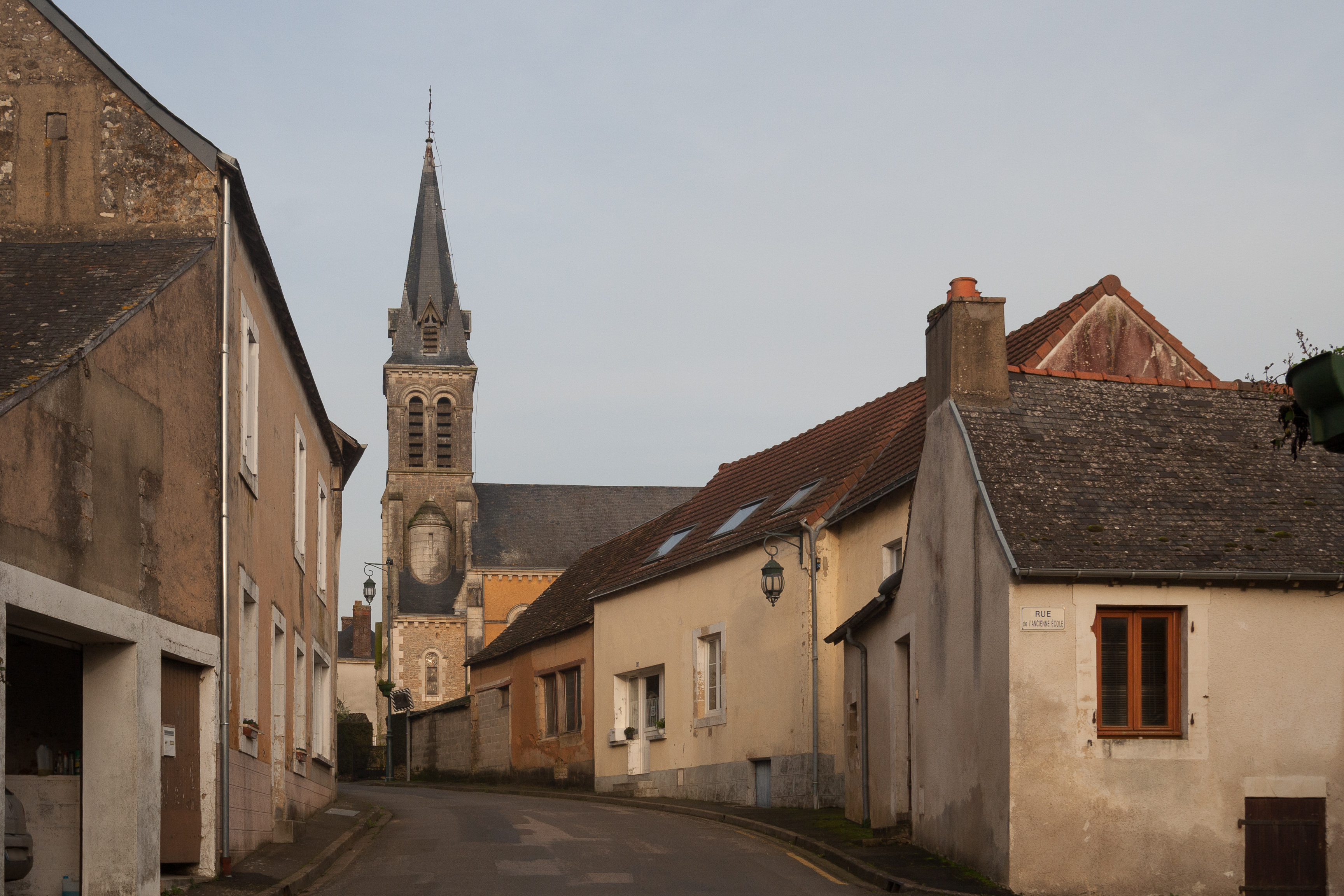 Vue du centre-bourg de Ruillé-en-Champagne depuis la rue du Tertre.